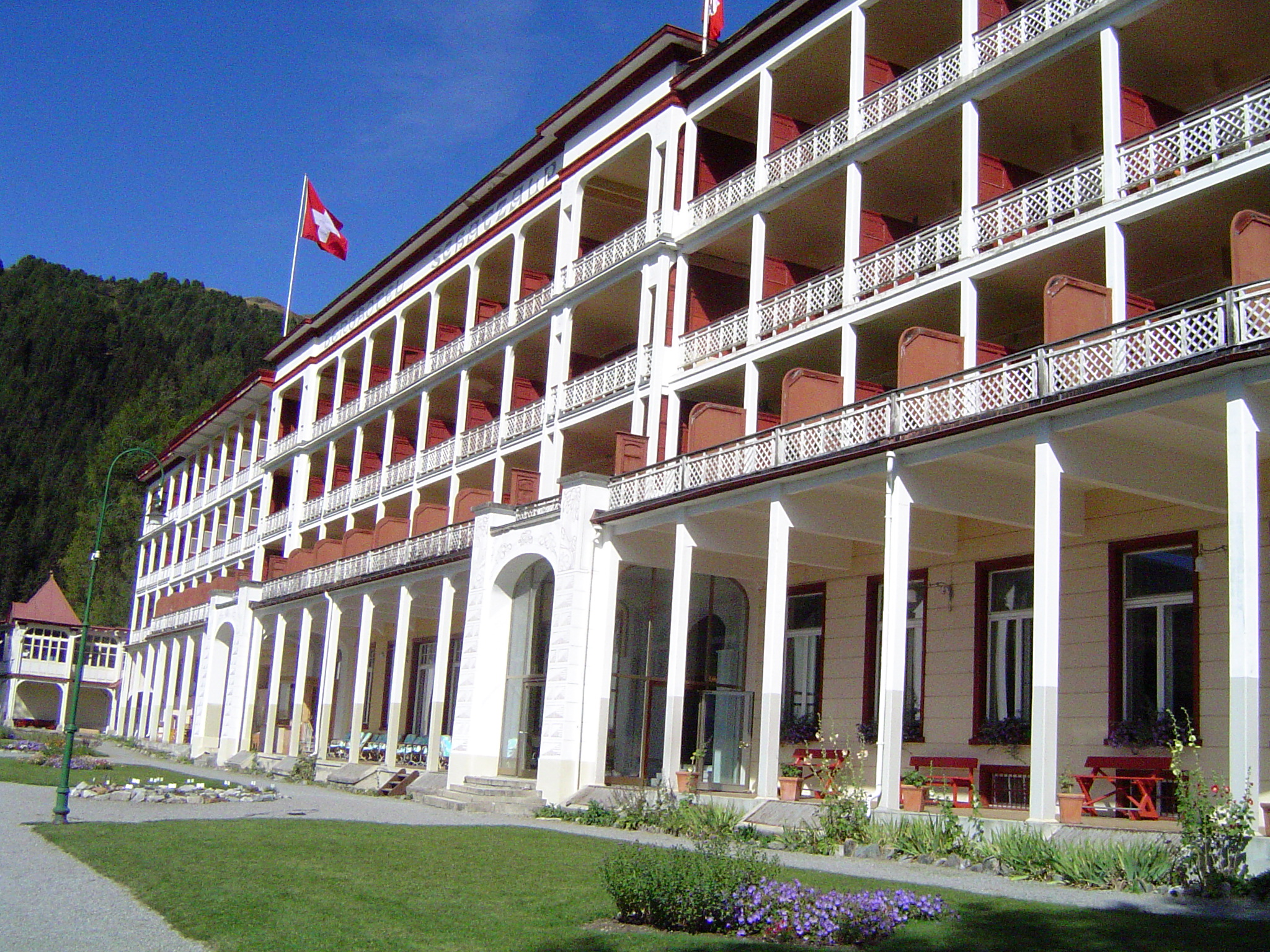 Davos, Berghotel Schatzalp voorgevel naar links gezien